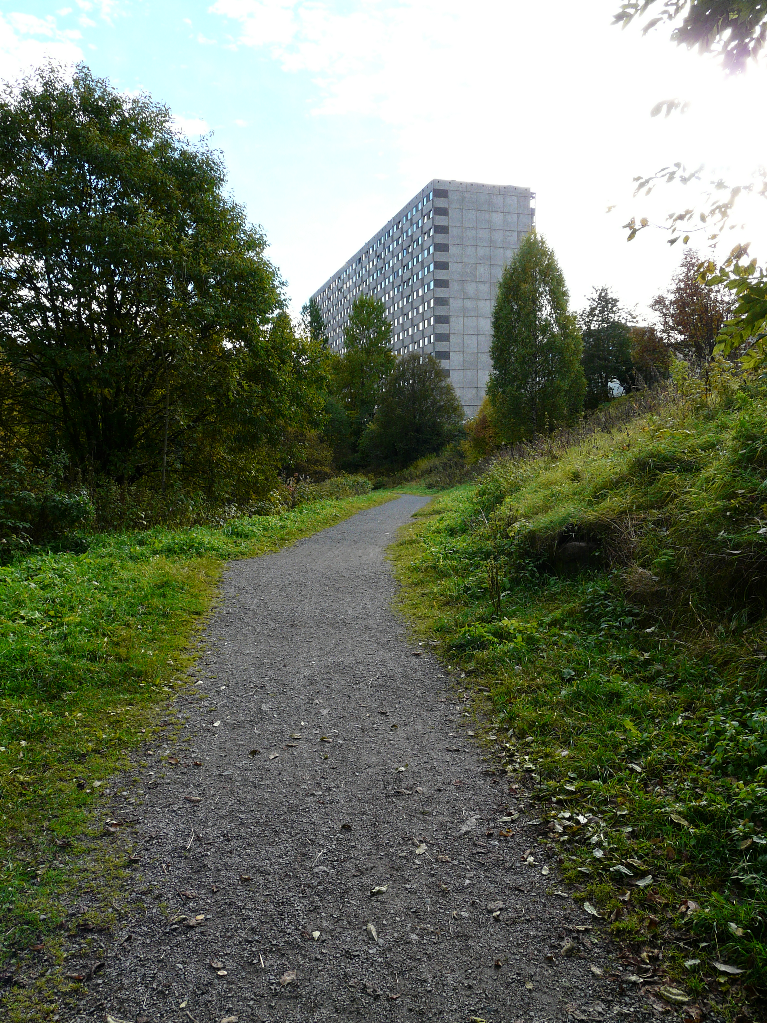 Blokk i Ammerudlia borettslag sett fra gangstien ved Alna.